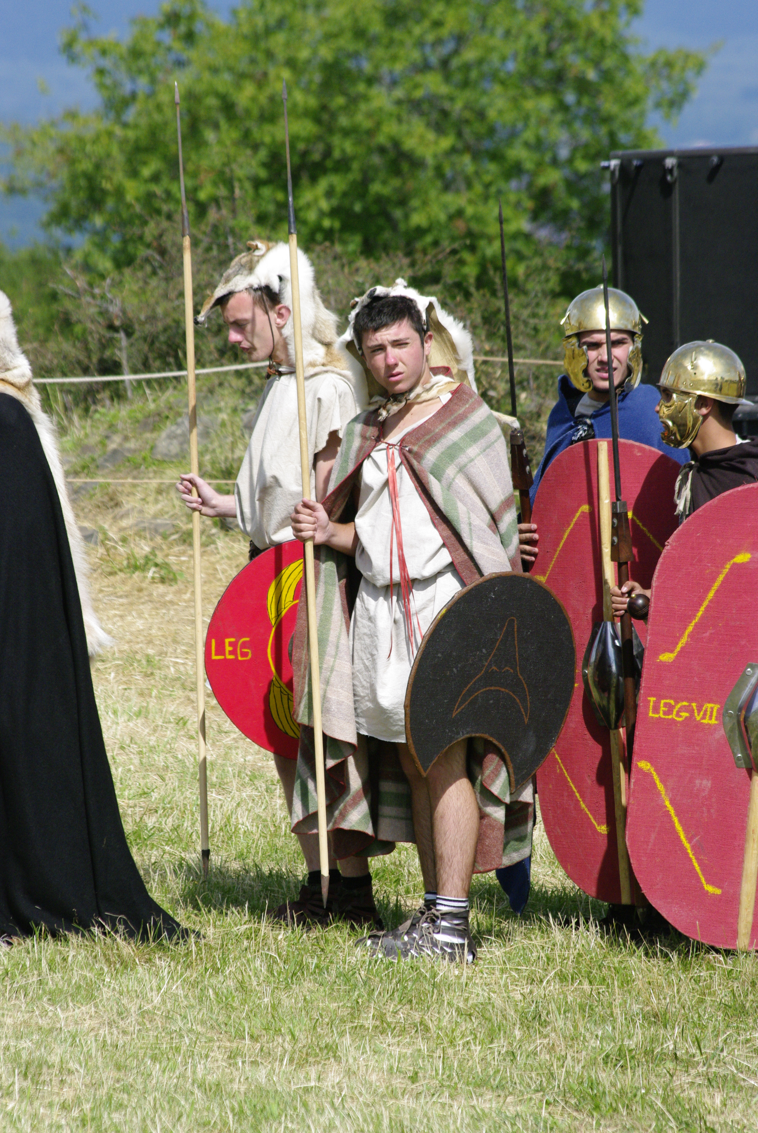 Vélites romains. Photographie réalisée le 22 juillet 2012 sur le plateau de Gergovie lors des Arverniales.